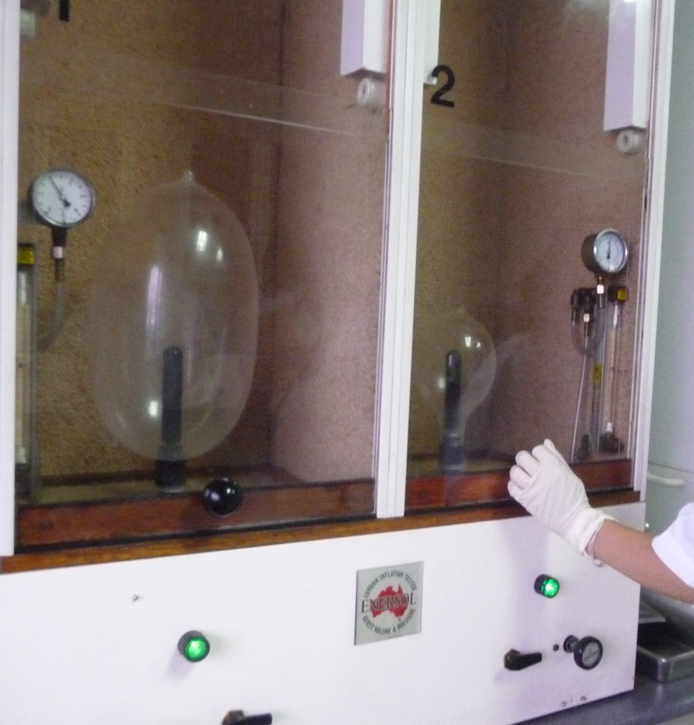 préservatifs test résistance et flexibilité condoms museum